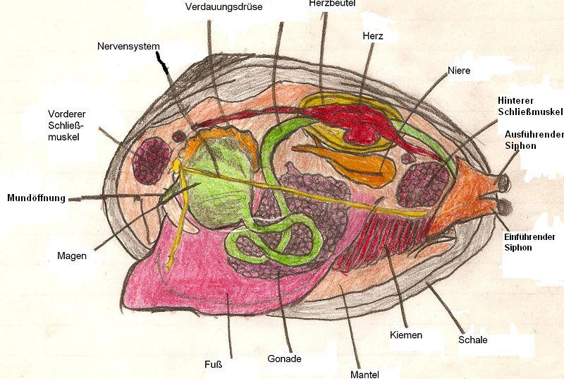 Große Teichmuschel Anodonta Cygnea